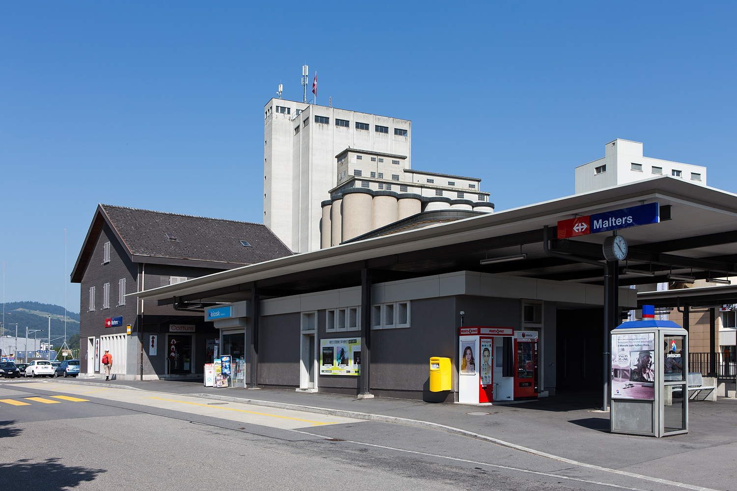 Bahnhof in Malters (LU)